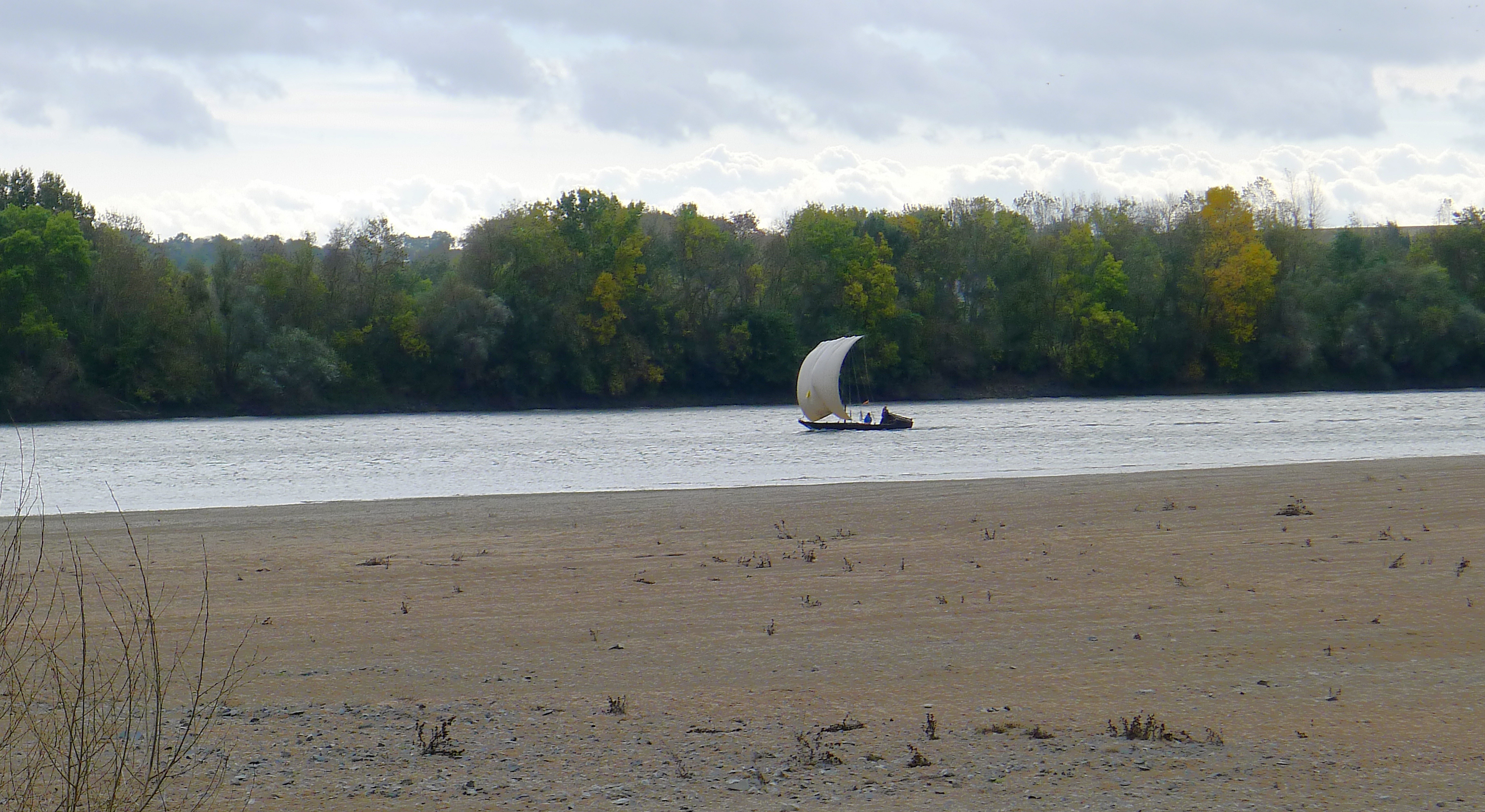 Gabare remontant la Loire au niveau de l'île Béhuard - Maine et Loire (France)